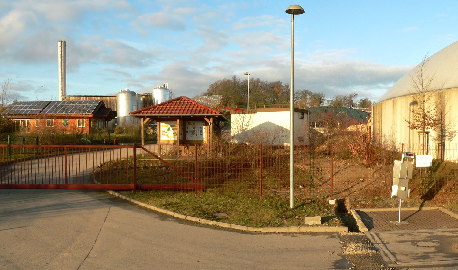 Toreinfahrt zur Biogasanlage Jühnde